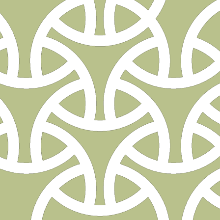 日本の伝統文様である「輪違い」の例。